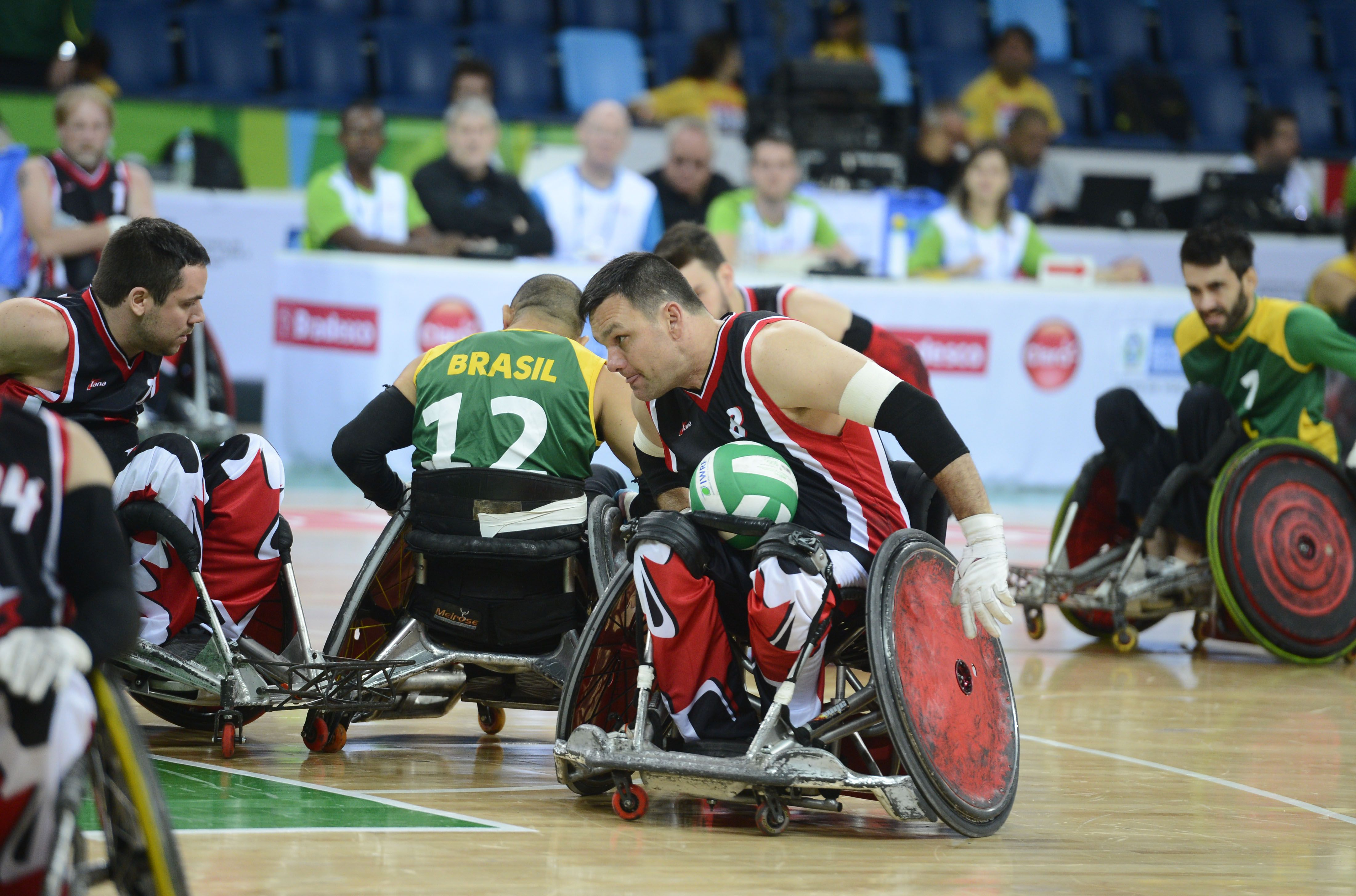 Rio de Janeiro - Seleção Brasileira de Rugby em Cadeira de Rodas enfrenta o Canadá em jogo no evento-teste Aquece Rio, na arena Carioca 1, no Parque Olímpico da Barra da Tijuca.